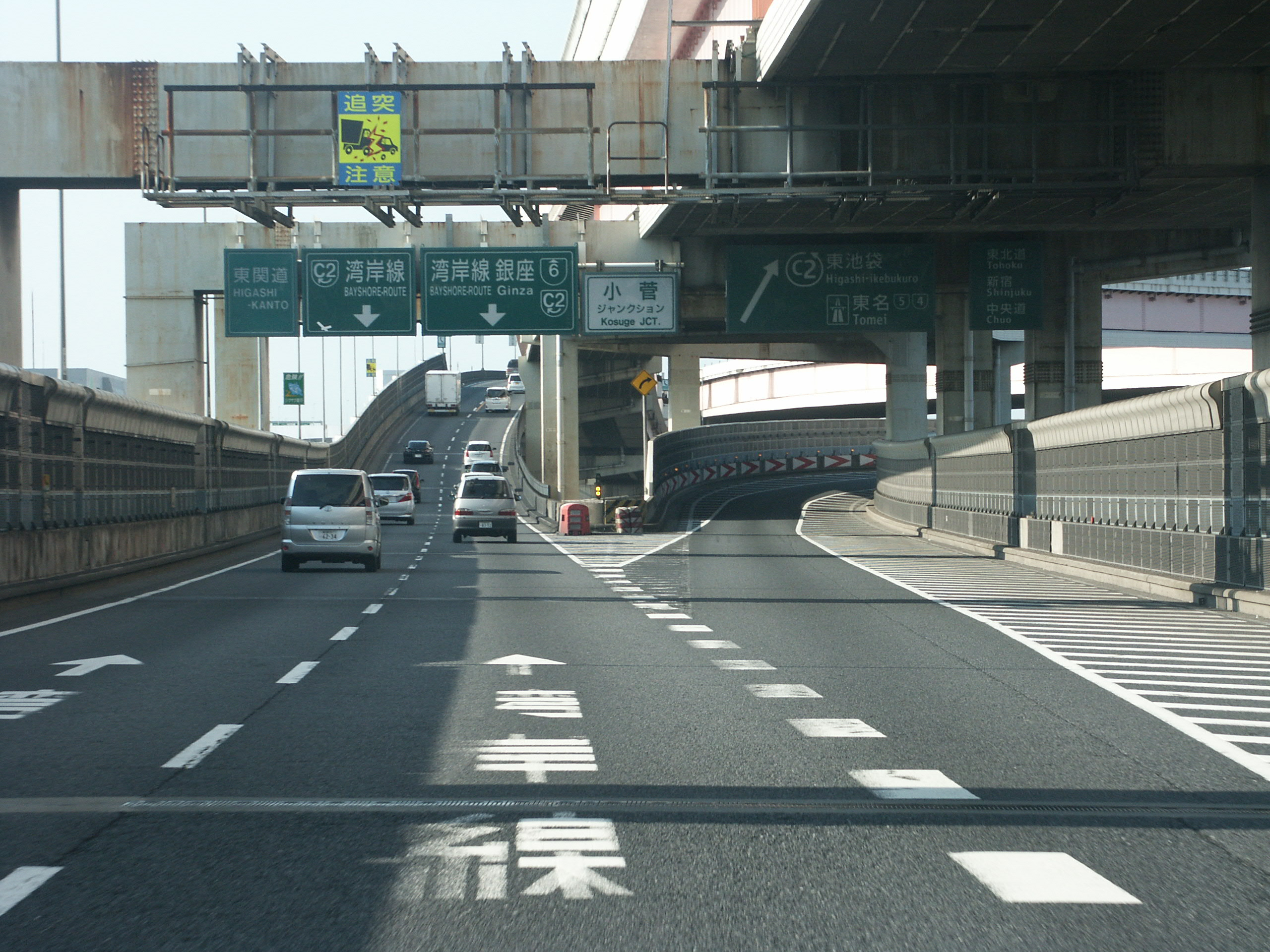 首都高速6号三郷線小菅ジャンクション上り分岐付近